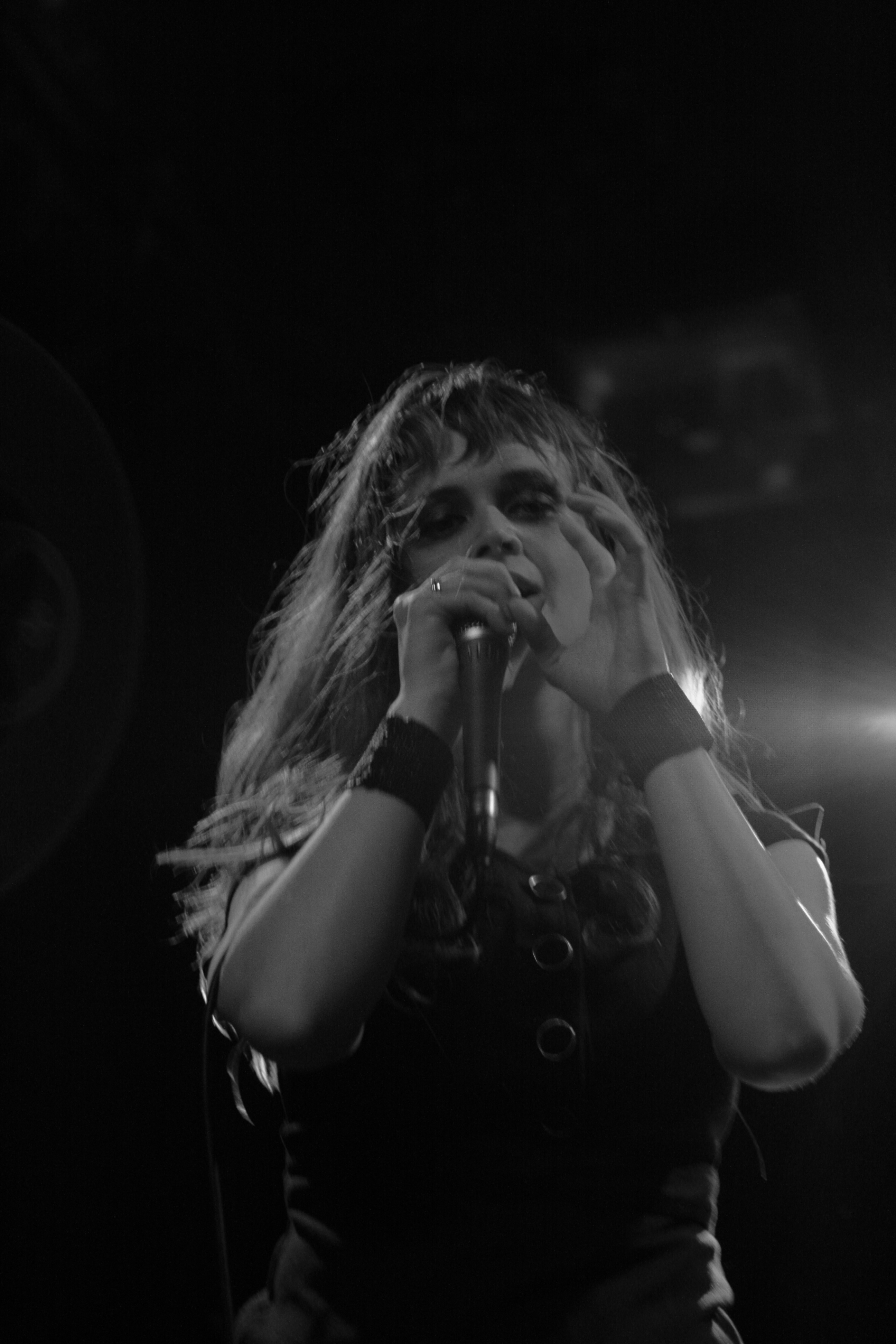 brooklyn vegan party brooklyn vegan party